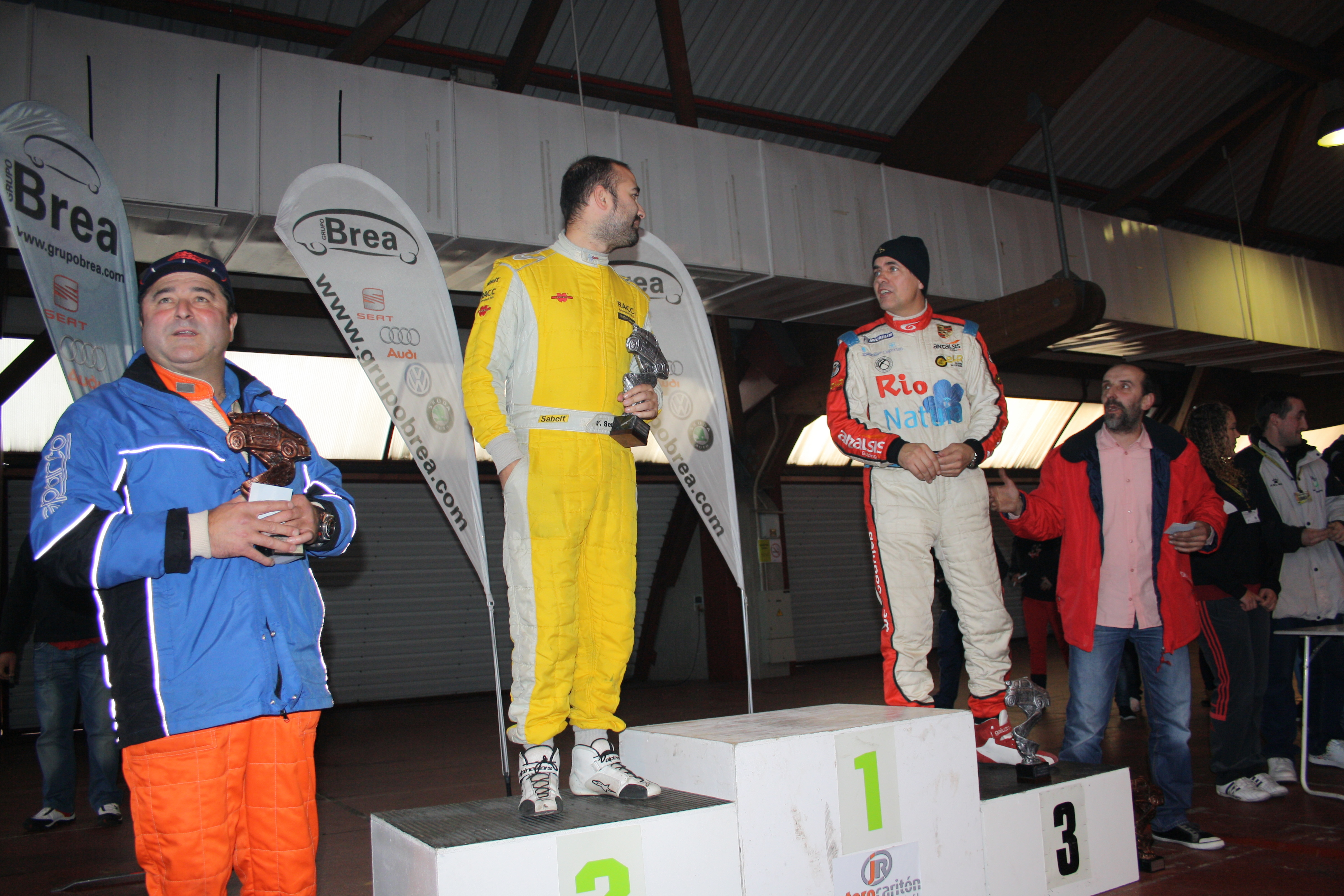 2º Master de Campeones de Galicia. Recinto Ferial de Amio. Diciembre de 2012